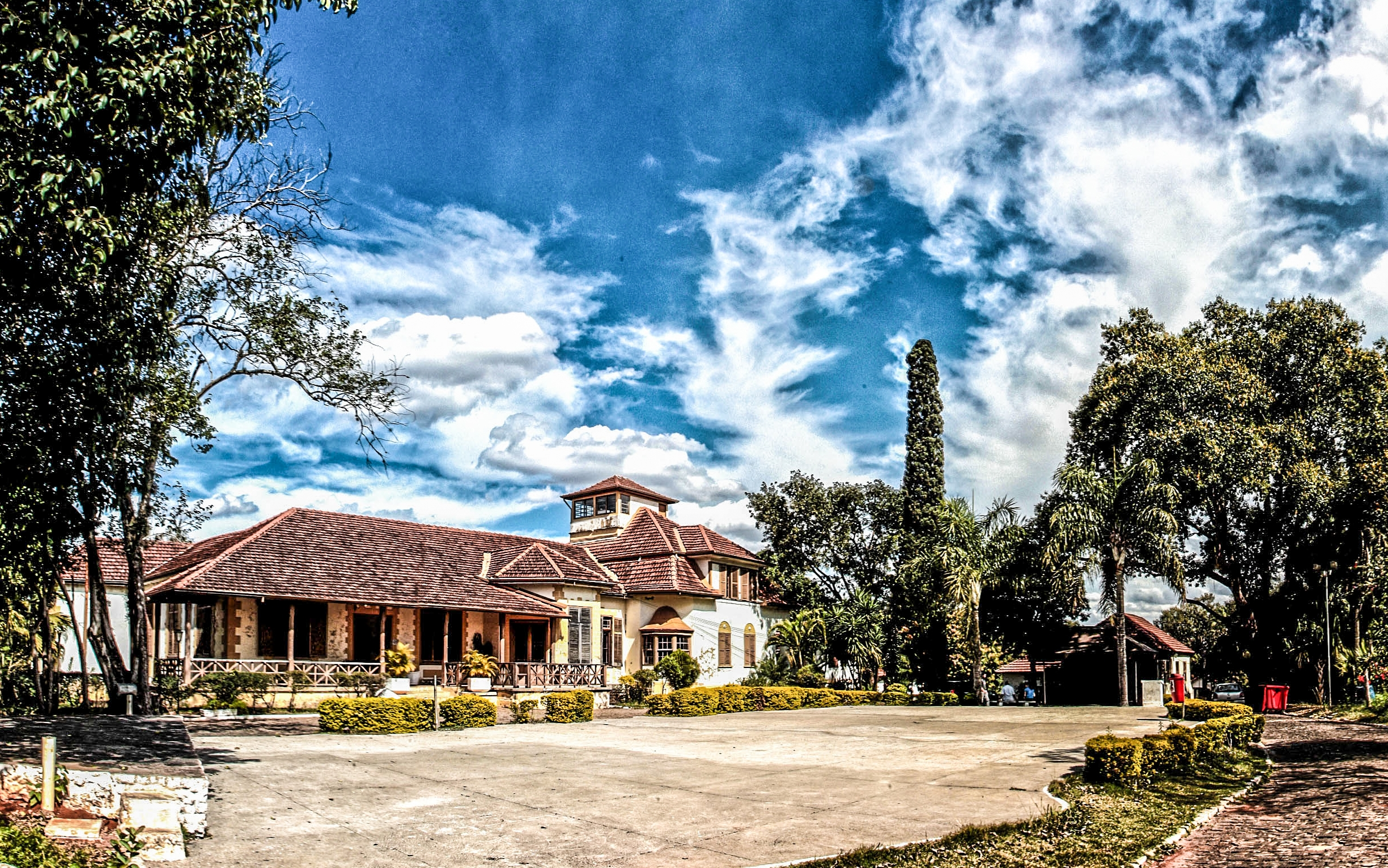 Complexo Industrial Carioba